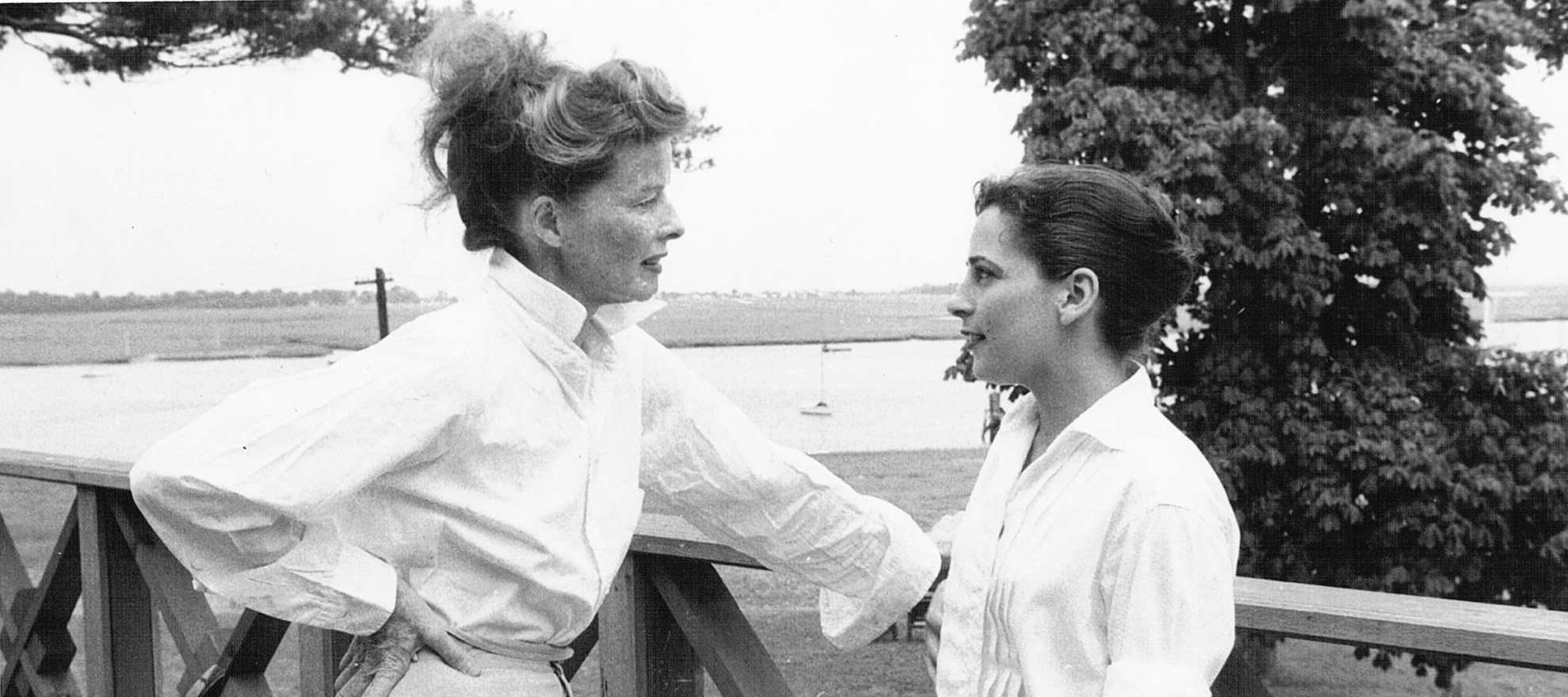 דינה דורון עם השחקנית קתרין הפבורן